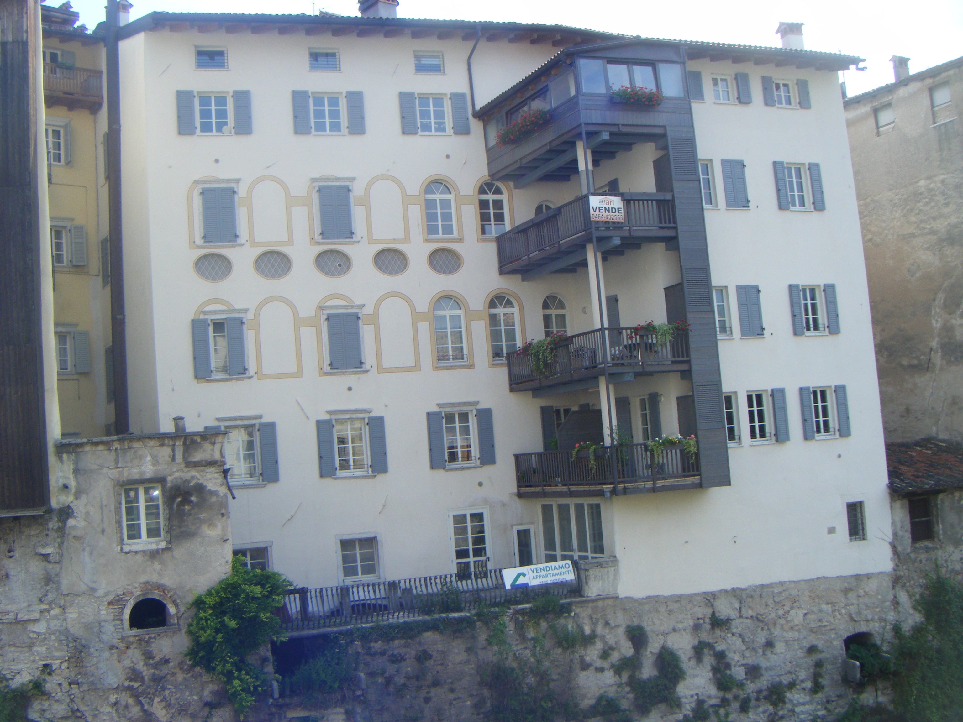 Filatoio n. 32, via S. Maria